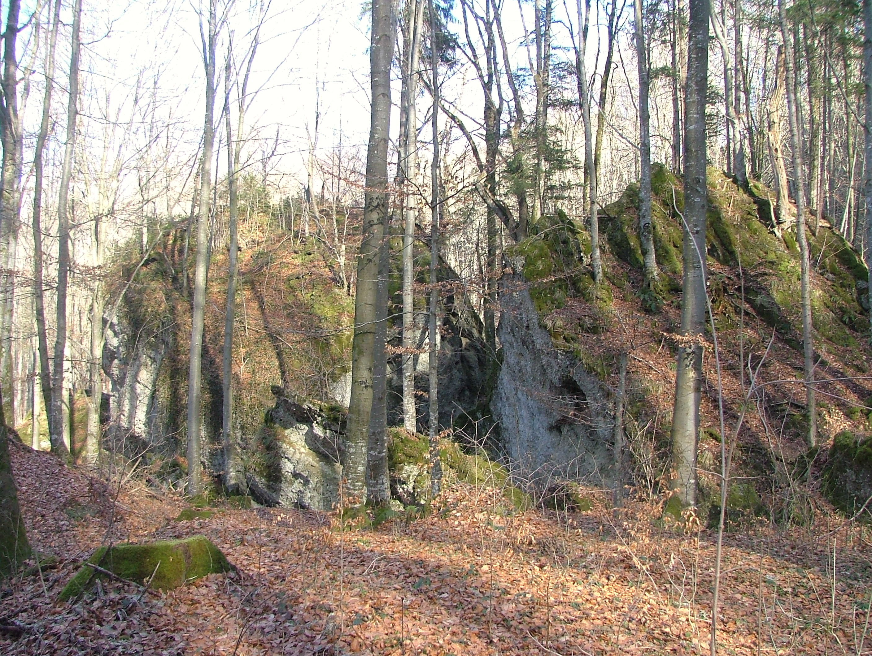 Ronsberg